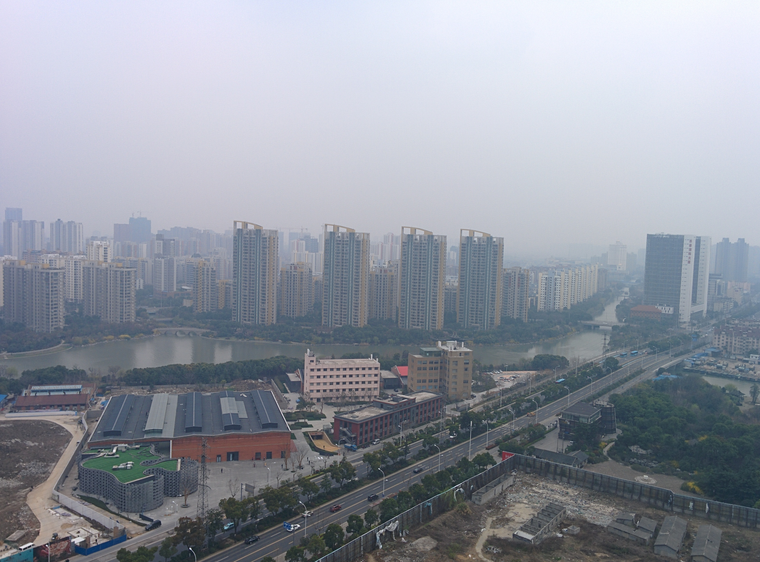 Binhu, Wuxi, Jiangsu, China